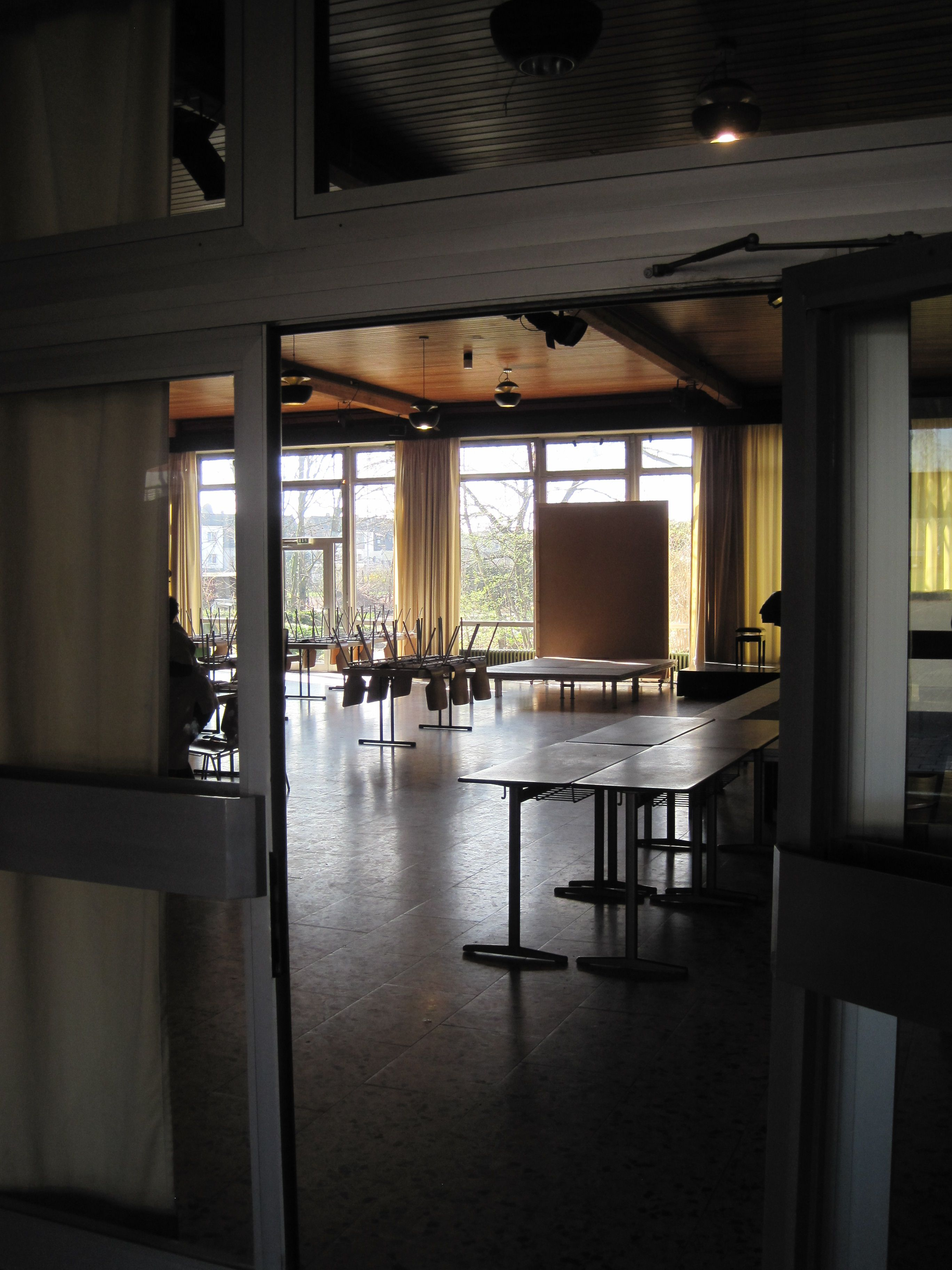 Das Foto zeigt die Aula des Galilei-Gymnasiums Hamm.